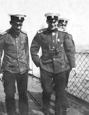 Улыбка Колчака. Редкий снимок, сделан английским офицером на Балтике в 1916 г.